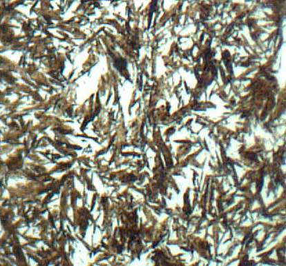 Иглы мартенсита (травление в 5% растворе азотной кислоты)